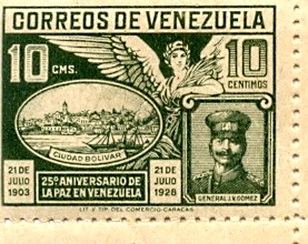 Estampilla venezolana de 1928 con Efigie del General Juan Vicente Gómez